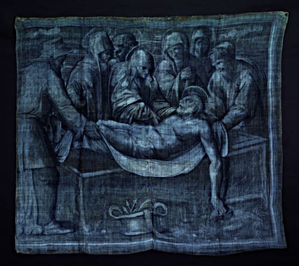 Una delle scene della Passione di Cristo dipinta su della «tela jeans», opera del pittore Teramo Piaggio, 1538, Abbazia San Nicolò del Boschetto, Genova – Italia.